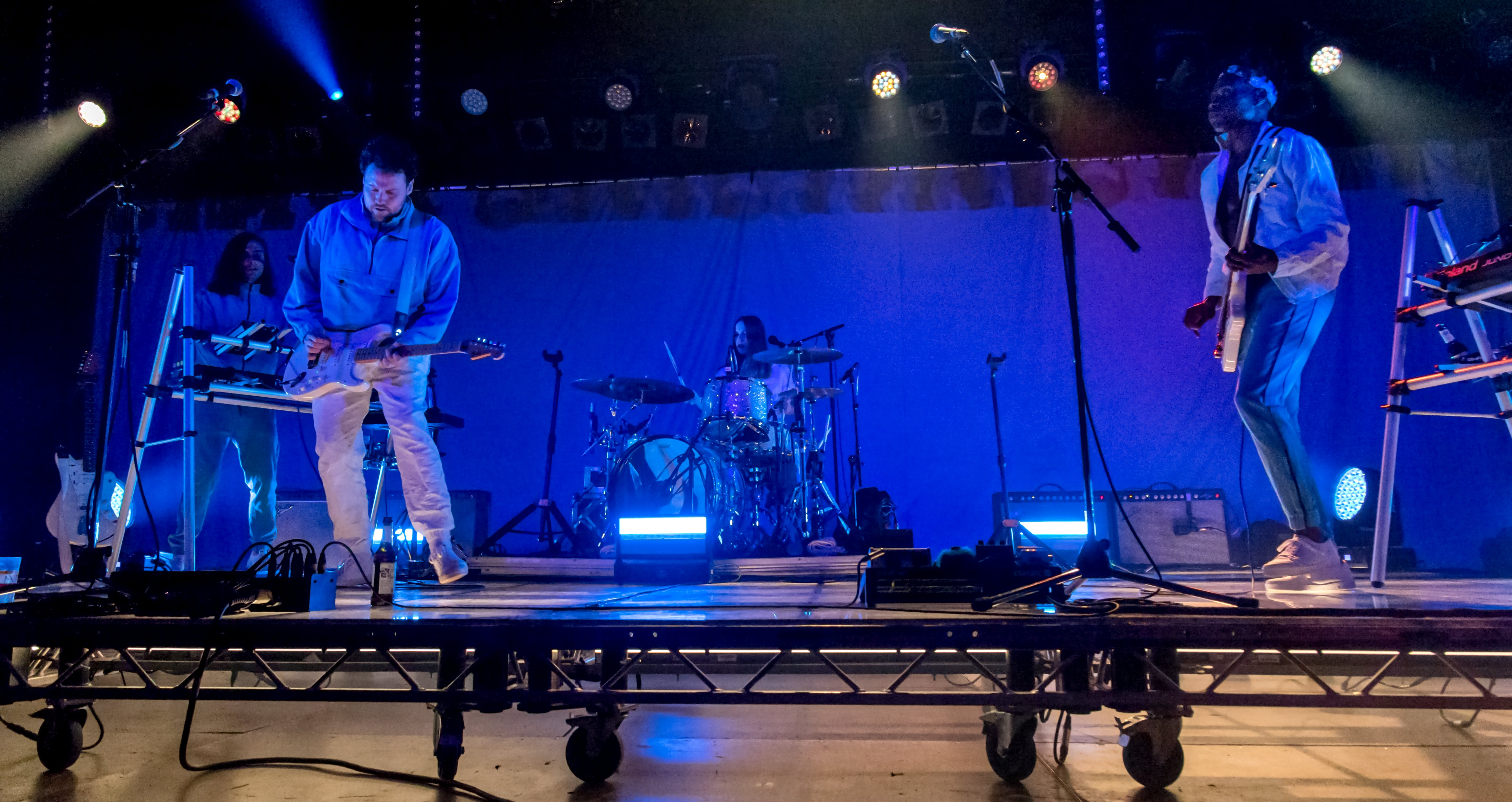 Bilder vom Zelt Musik Festival 2019 in Freiburg im Breisgau